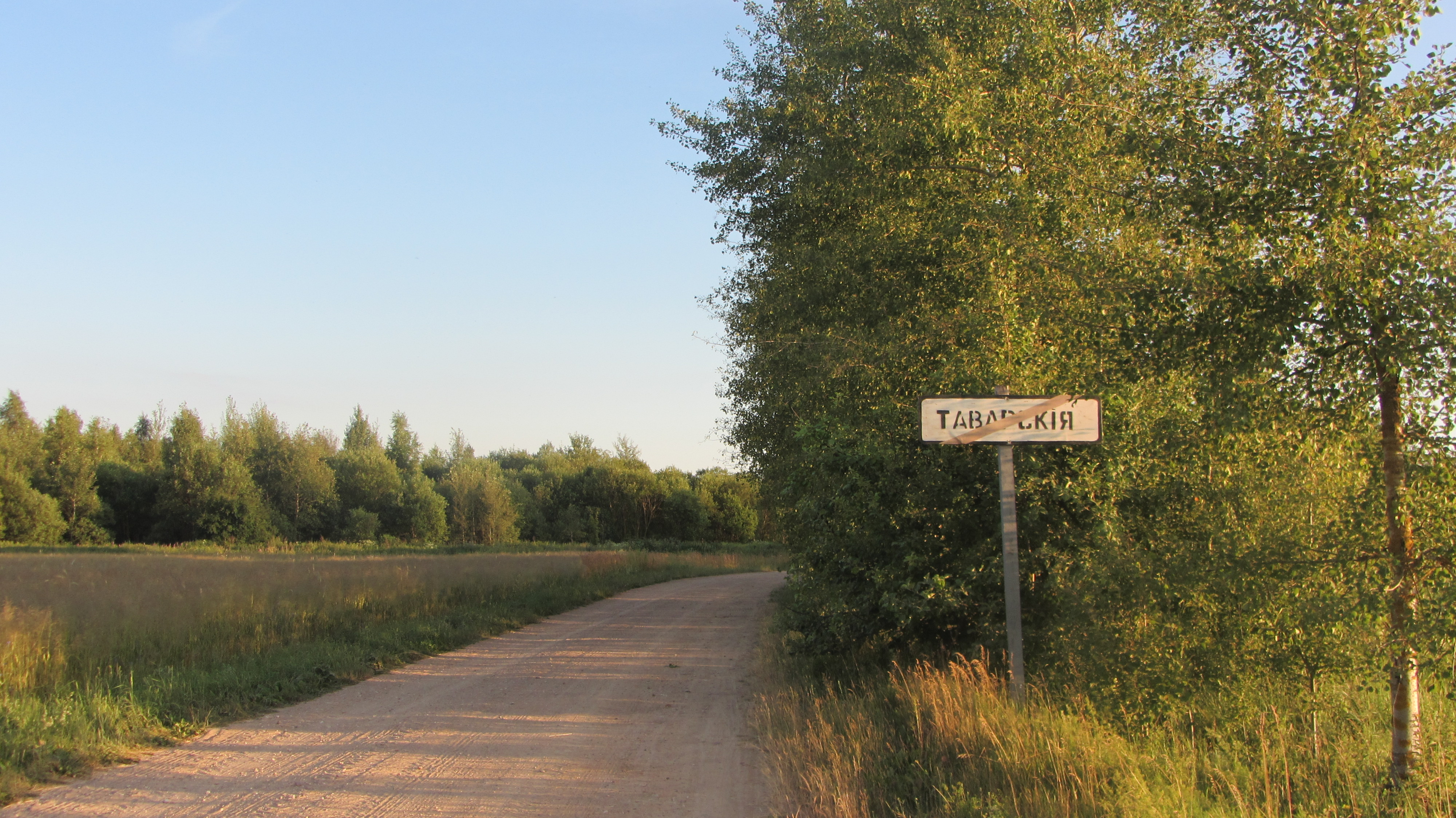 Вёска Таварскія, указальнік.